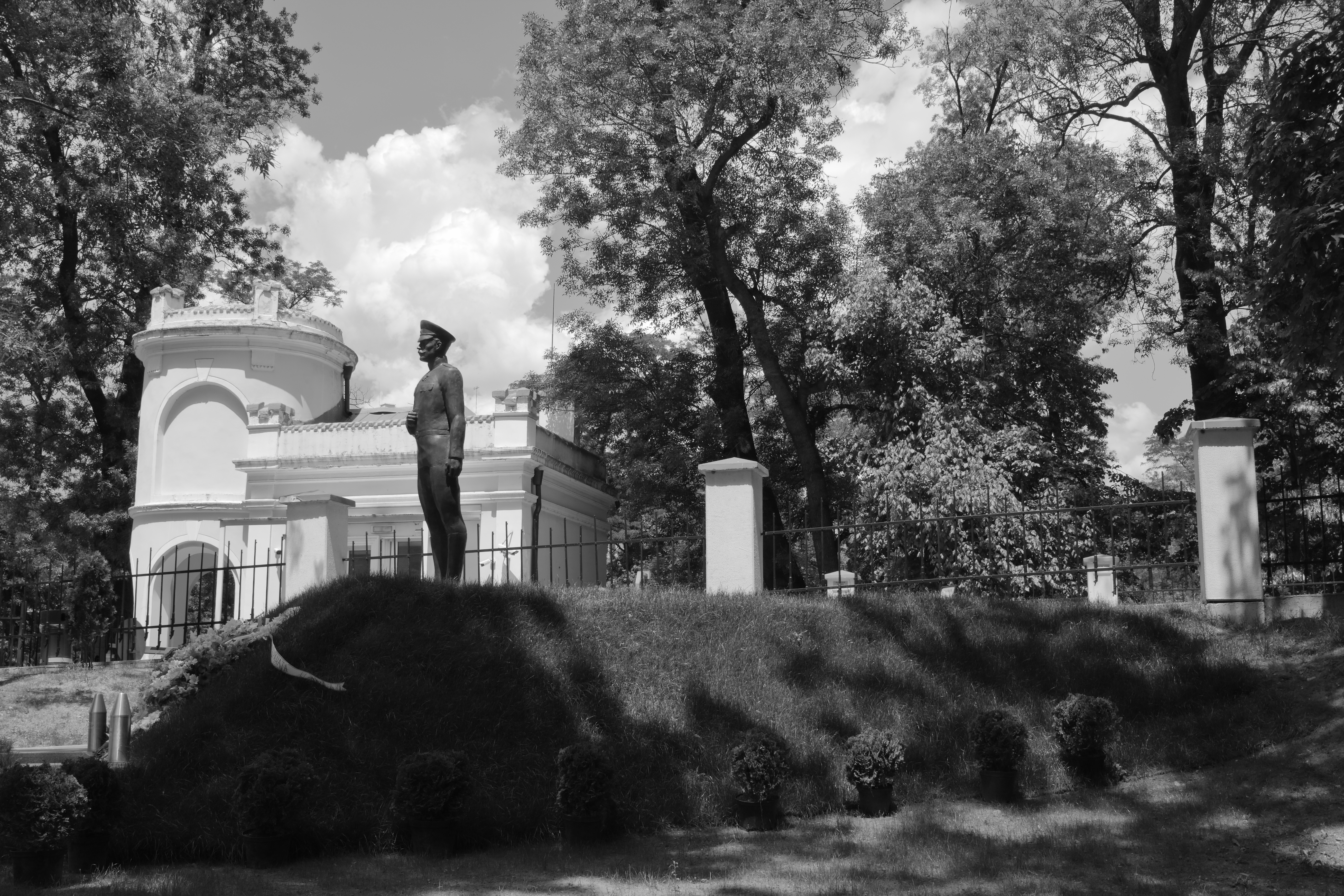 Паметник на полковник Борис Дрангов в парка на Военната академия в София. Автор на идейния проект за паметника е архитект д-р Венцислав Йочколвски, а монументът е реализиран от скулпторите Иван и Георги Тодорови. Фигурата на легендарния пълководец е висока 220 см, като се издига от постамент, който е висок 160 см. Статуята е така разположена, че да „гледа“ на югозапад, т.е. към Скопие, където е роден и погребан полковникът.